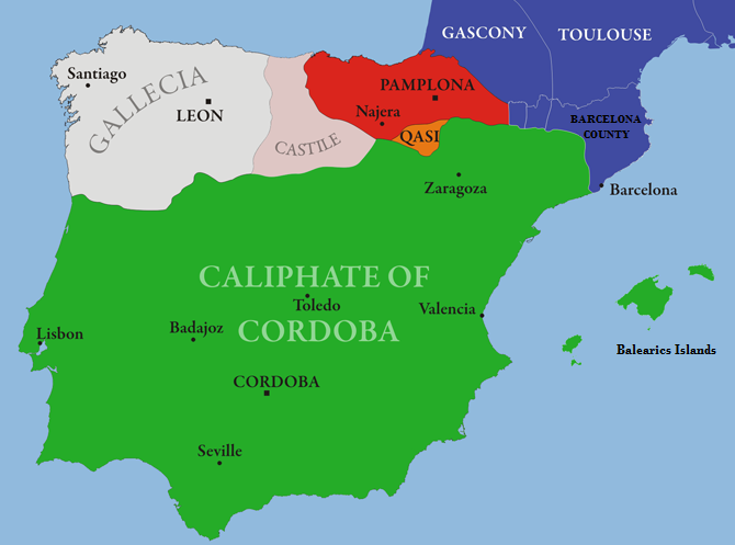 Al_Andalus & Christian Kingdoms